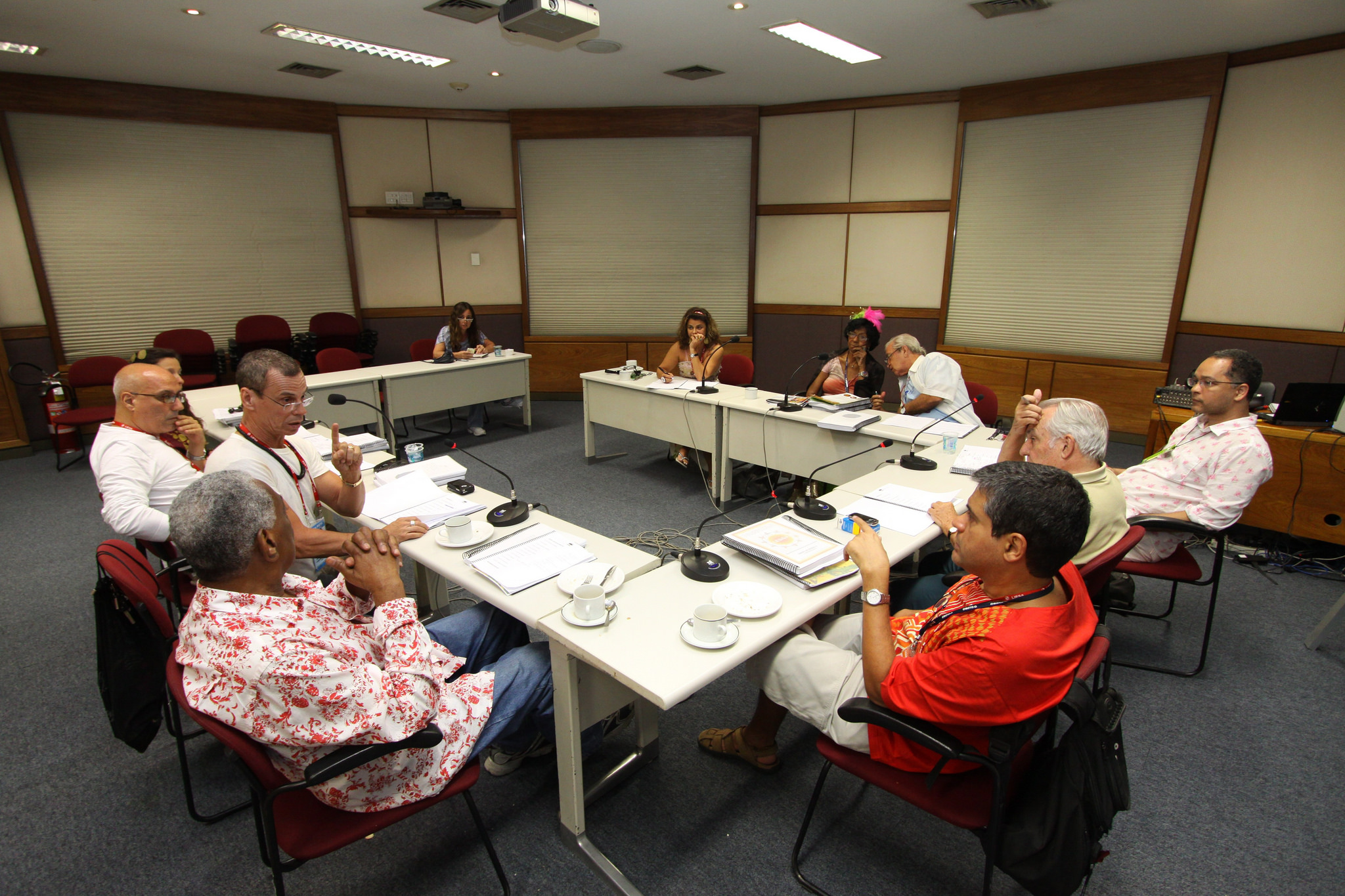 Reunião dos Jurados do Estandarte de Ouro. Foto Paulo Nicolella / Agência O Globo.